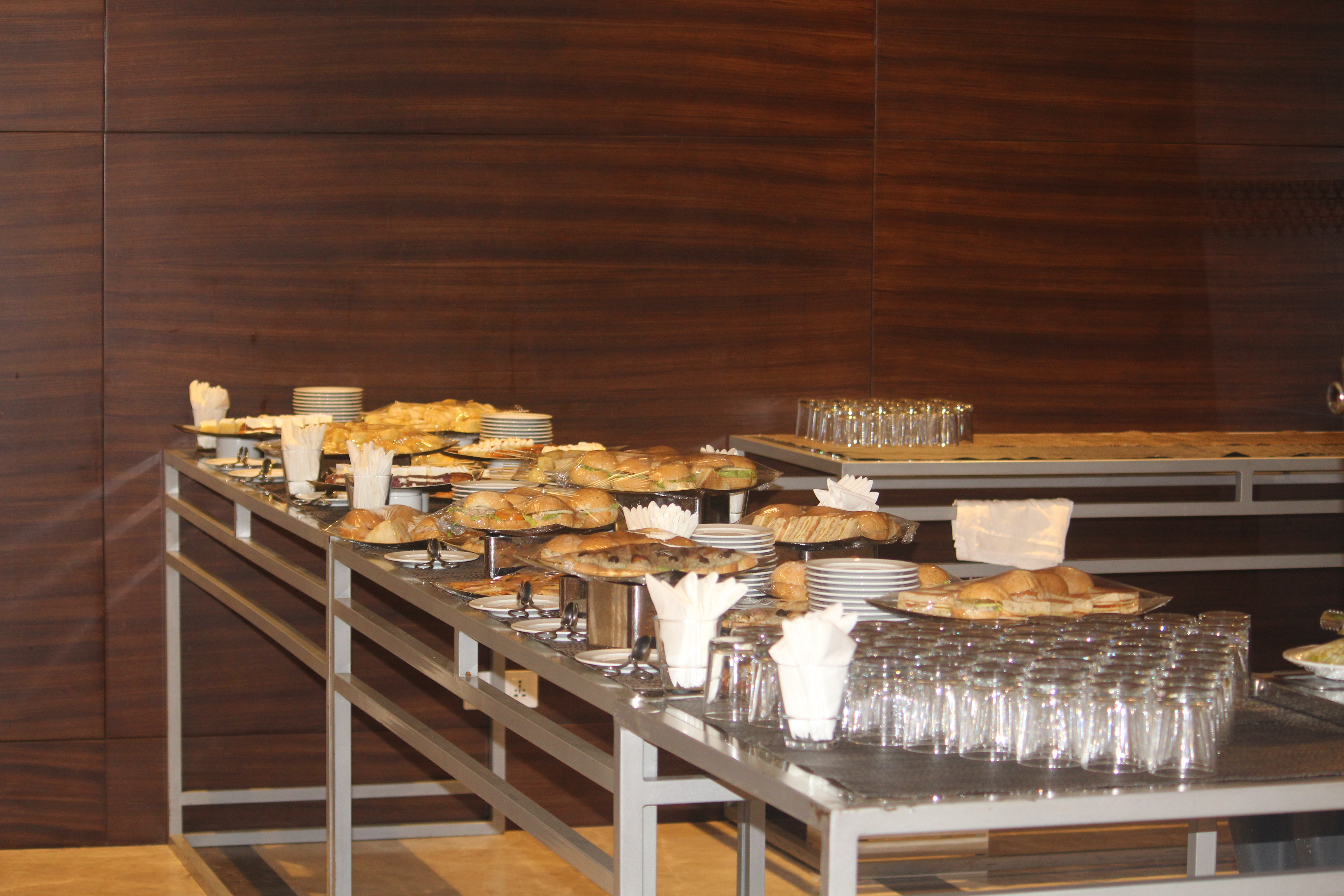 Banquet de Sheraton grand Conakry